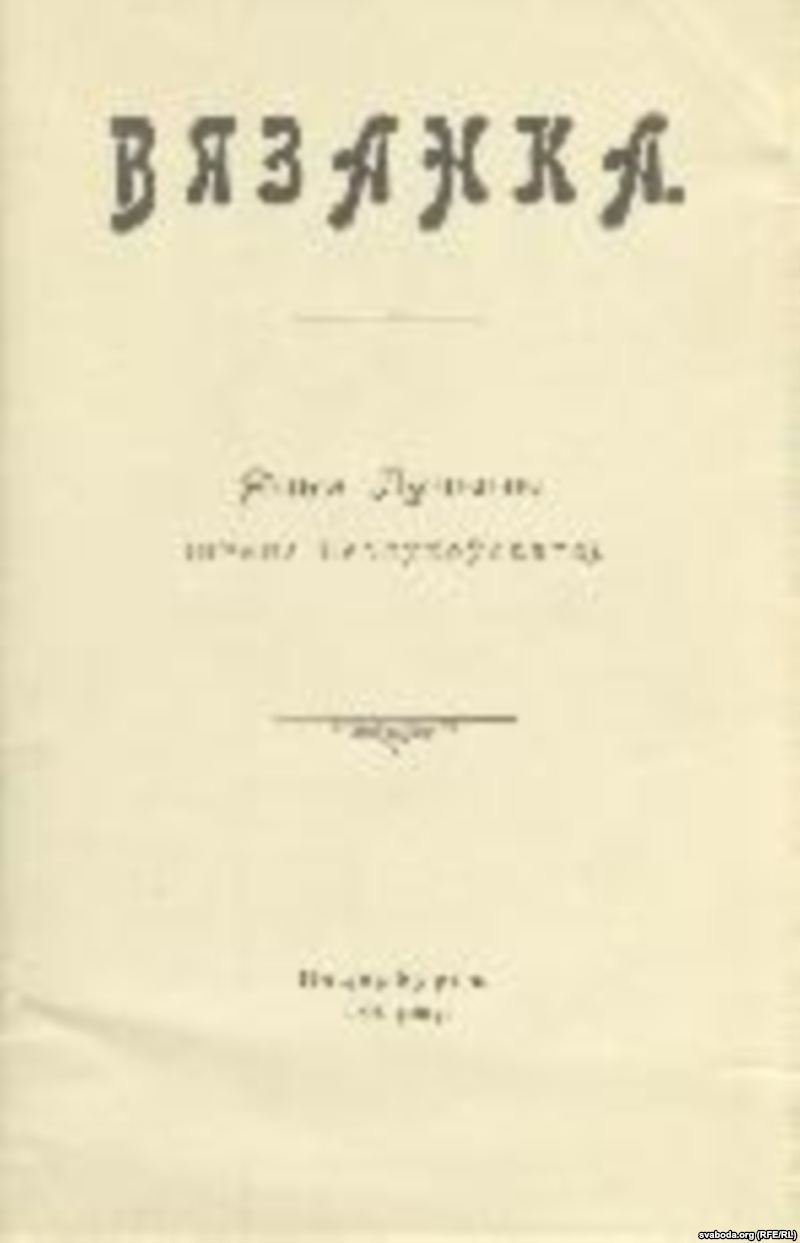 Беларуская (тарашкевіца): Вокладка зборніка вершаў "Вязанка" (1903)